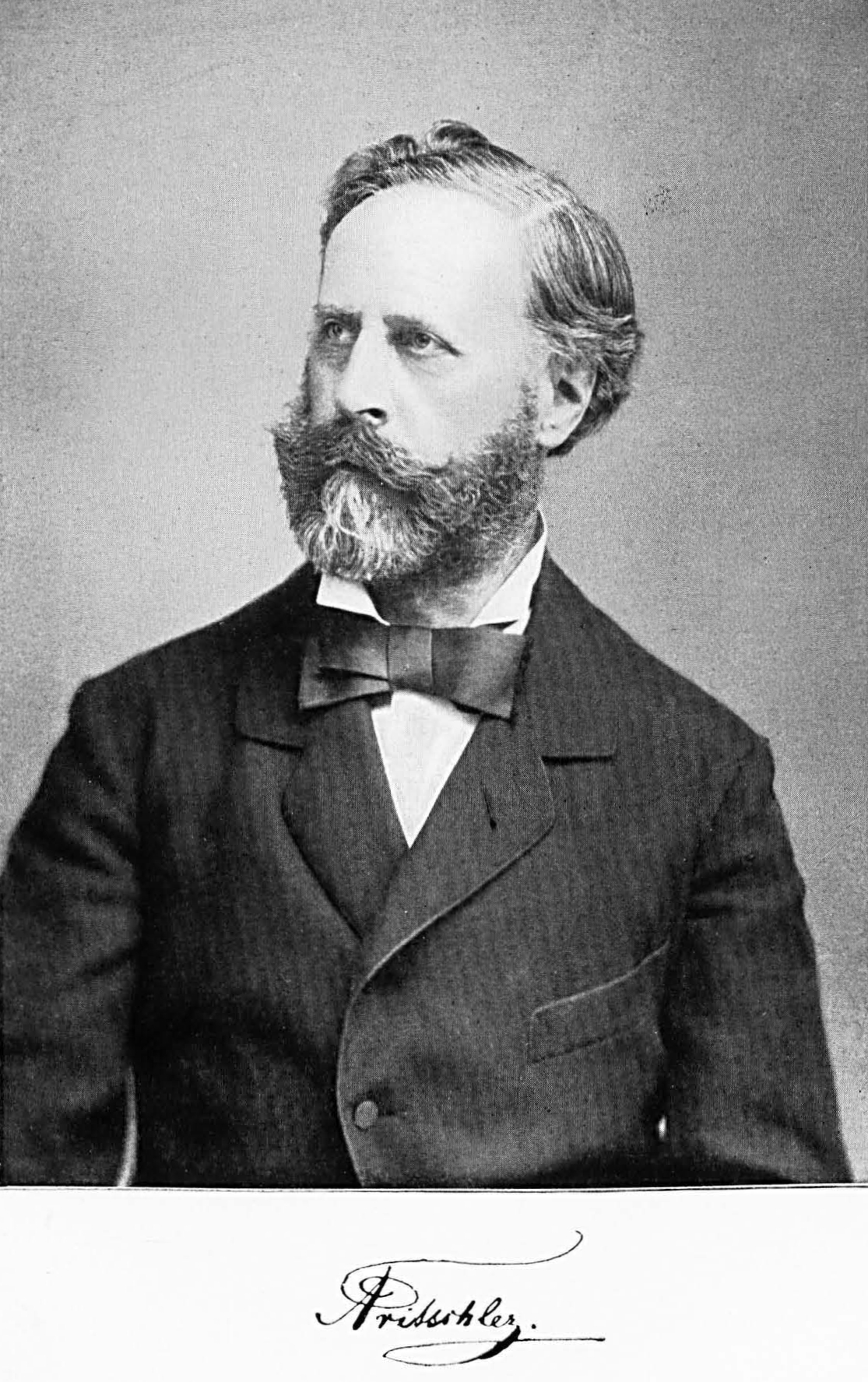 Alexander von Tritschler.jpg, Porträt.